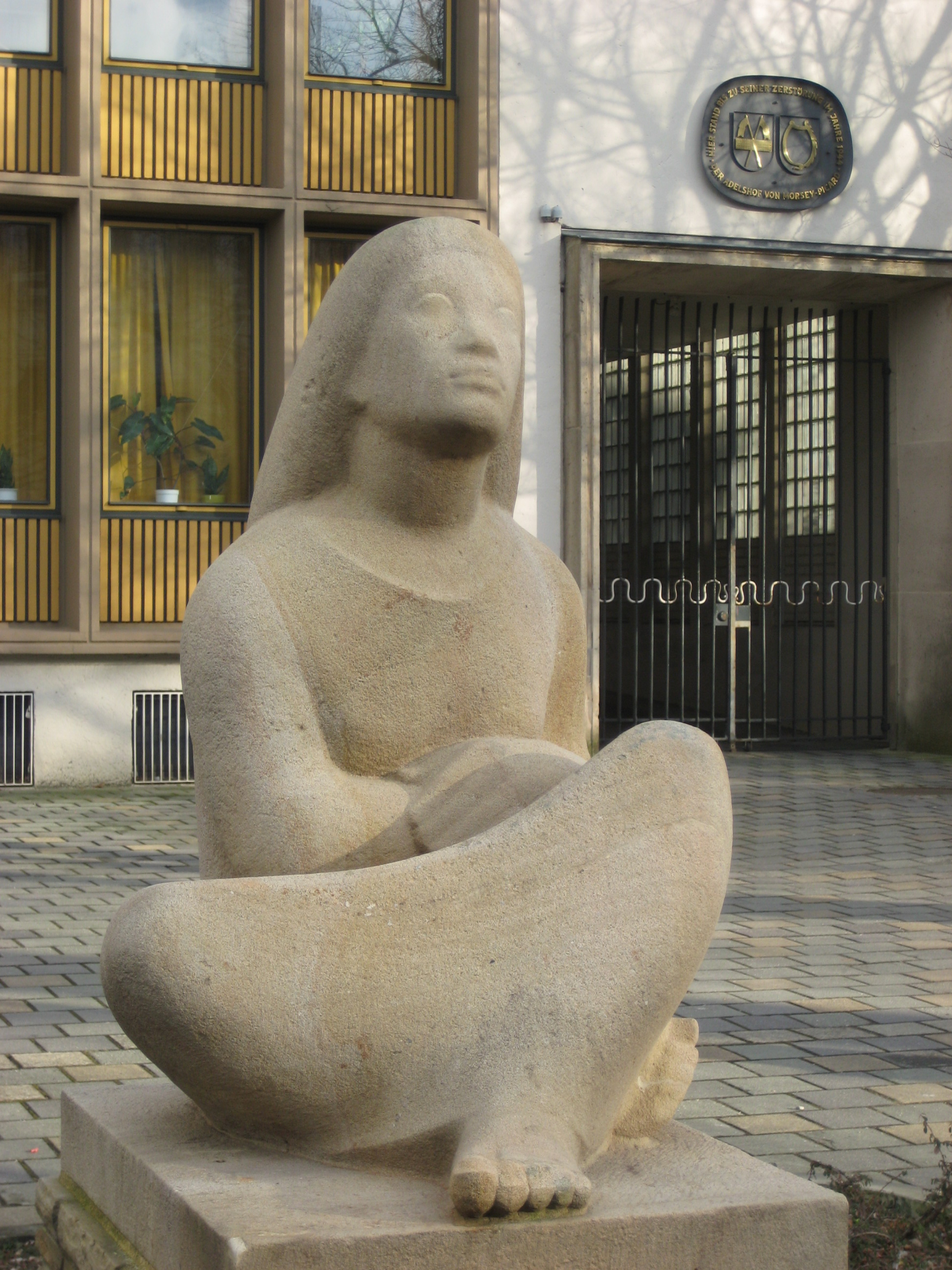 Fritz Szalinski (1905-1978): "Sitzende" oder "Sinnende" in Osnabrück, Sandstein, 1955, vor dem Behördenhaus Hakenstraße 15